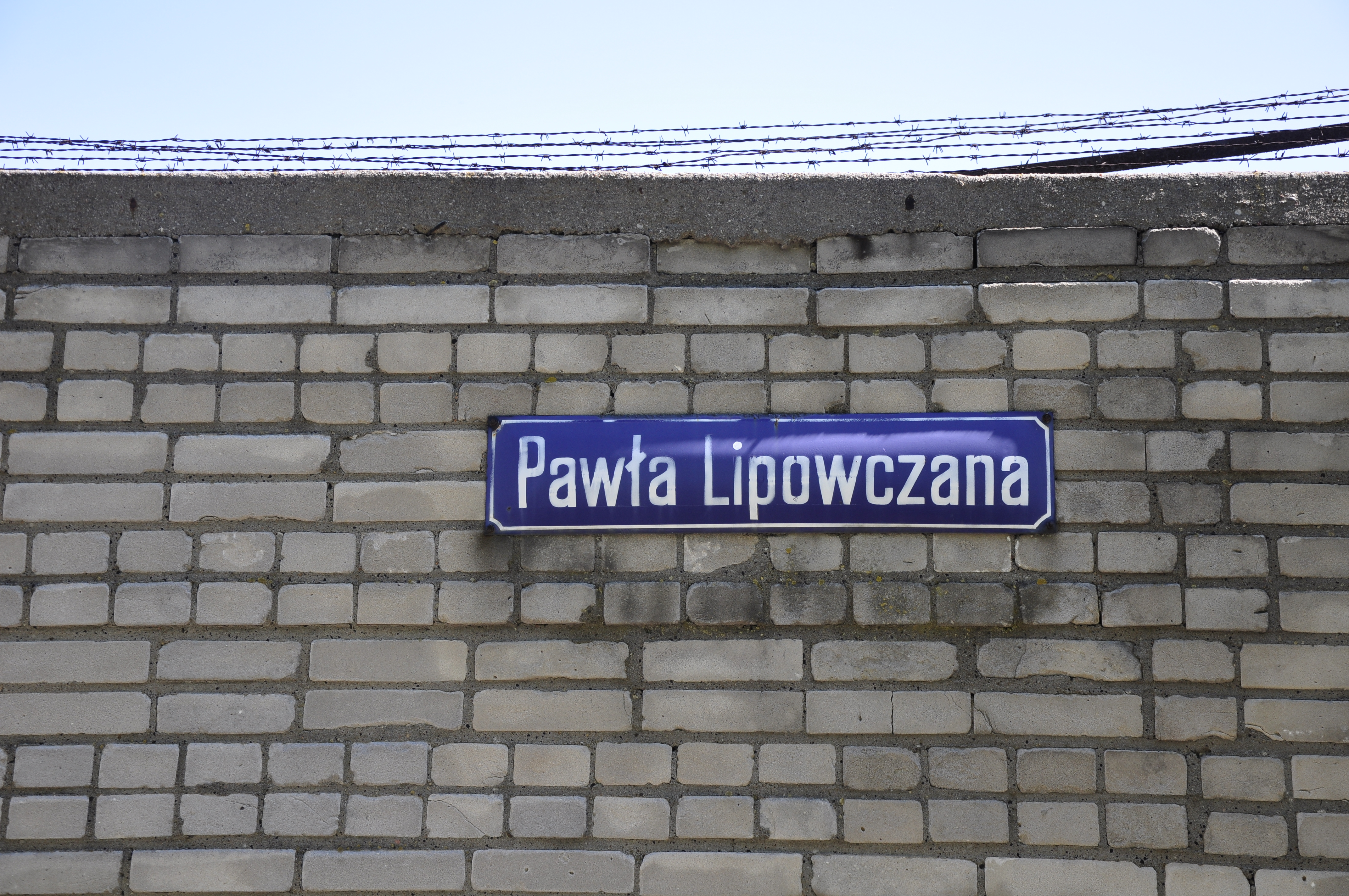 Strasse im rückärtigen Verteidigungsfelds des Fort VI, Warschau